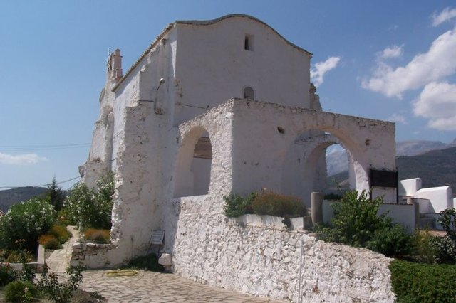 Ermita de Santa Ana, en Canillas de Albaida